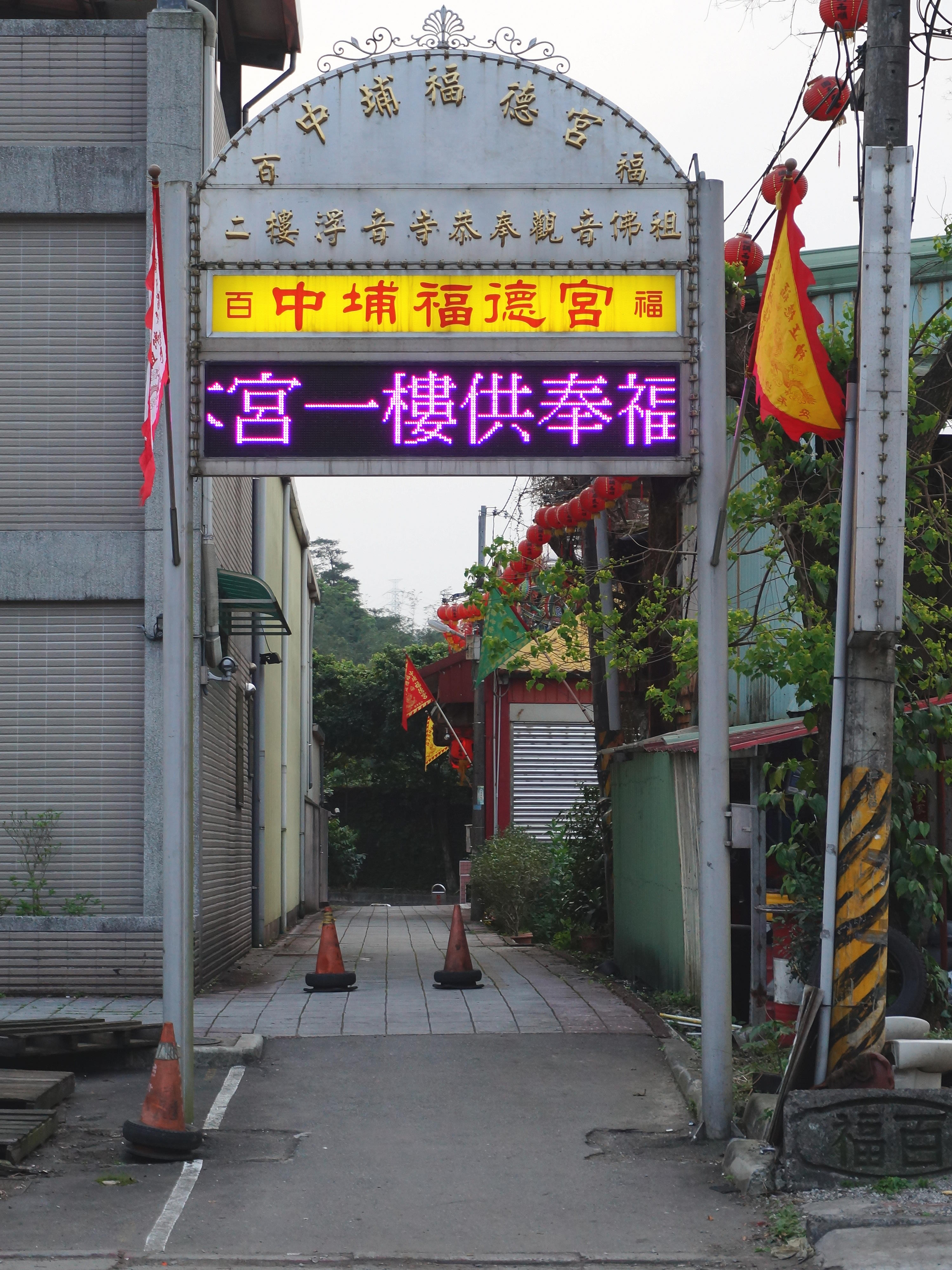 百福中埔福德宮金屬廟門，中央裝設宮名燈箱與LED顯示器。